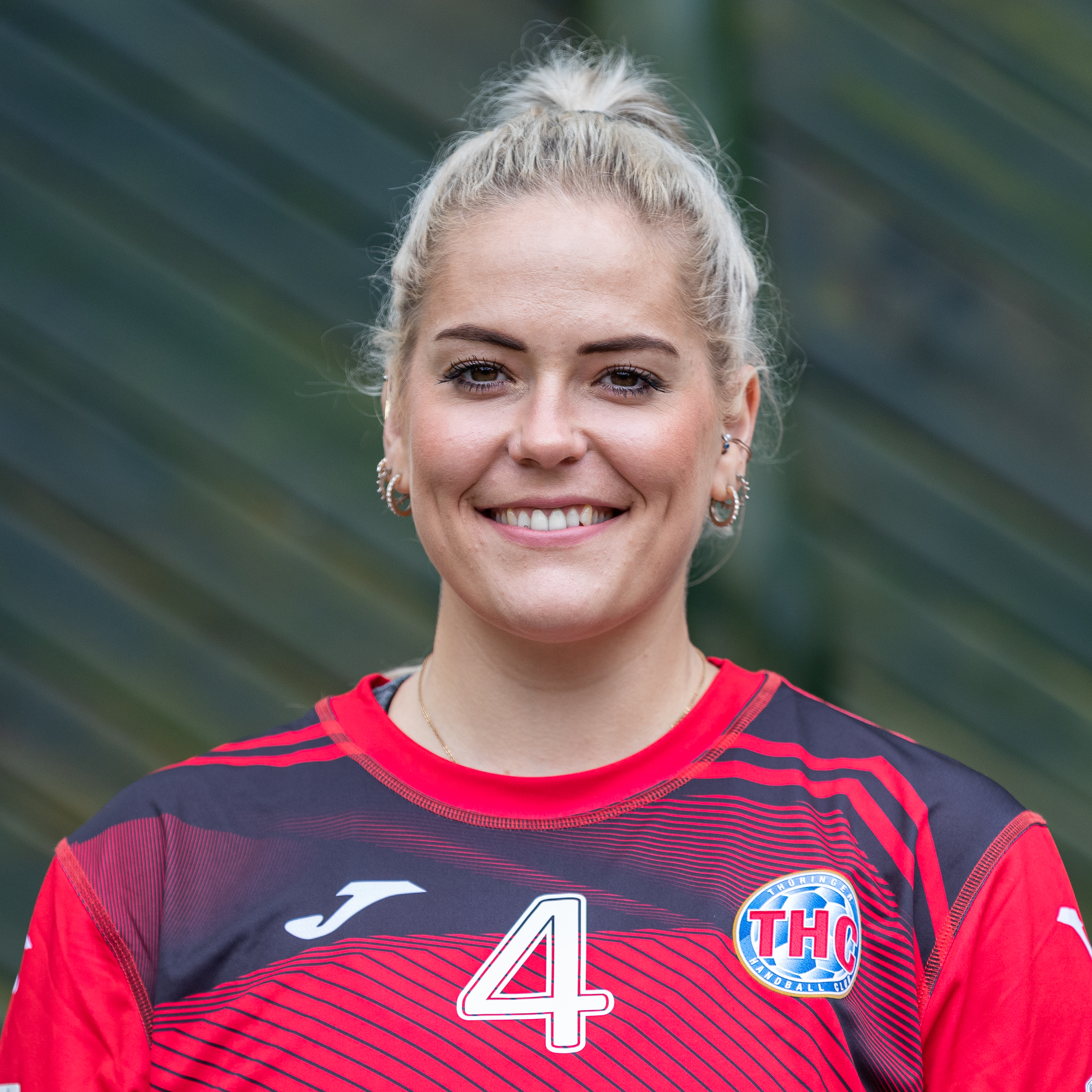 Handball, 1. Bundesliga Frauen, Thüringer HC, Teamfotos; Beate Scheffknecht (Thüringer HC, 4); Porträt, Einzelbild